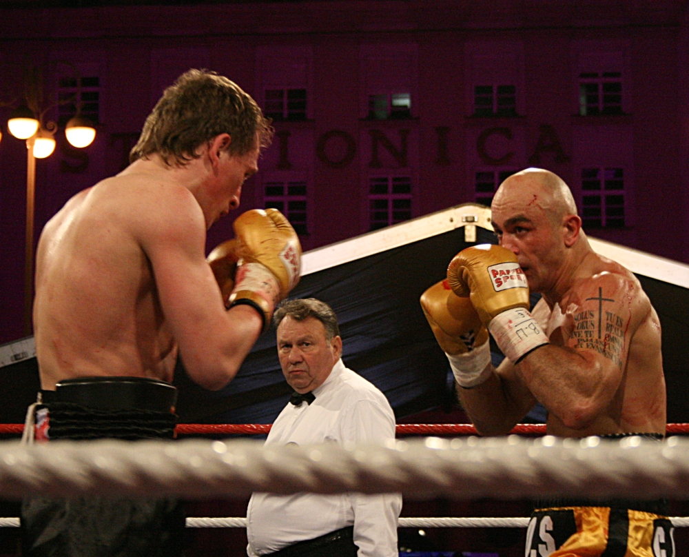 Vedran Akrap i Aleksej Čirkov tijekom borbe u Zagrebu